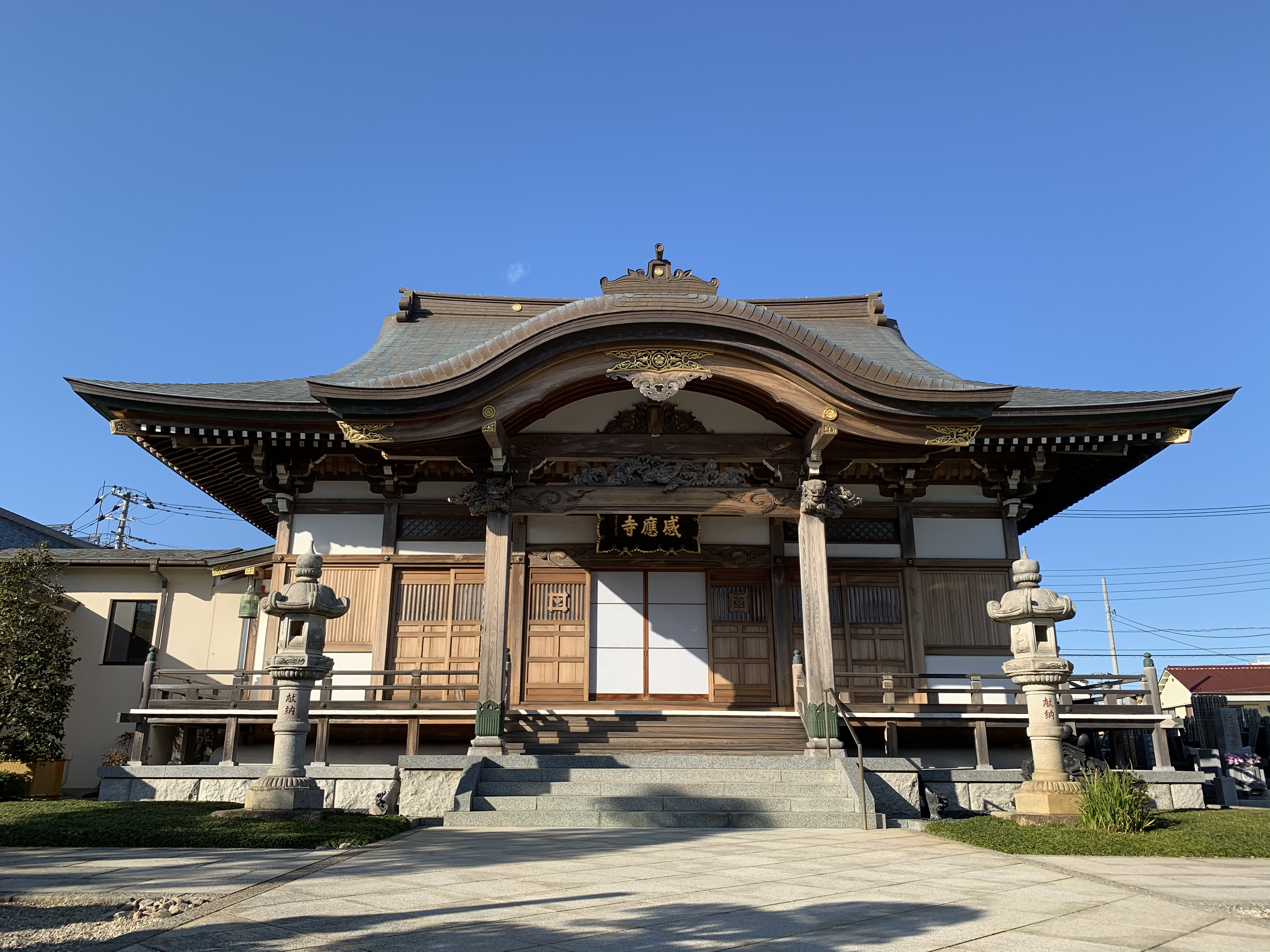 東京都江戸川区一之江にある日蓮宗江久山感応寺（感應寺）の本堂